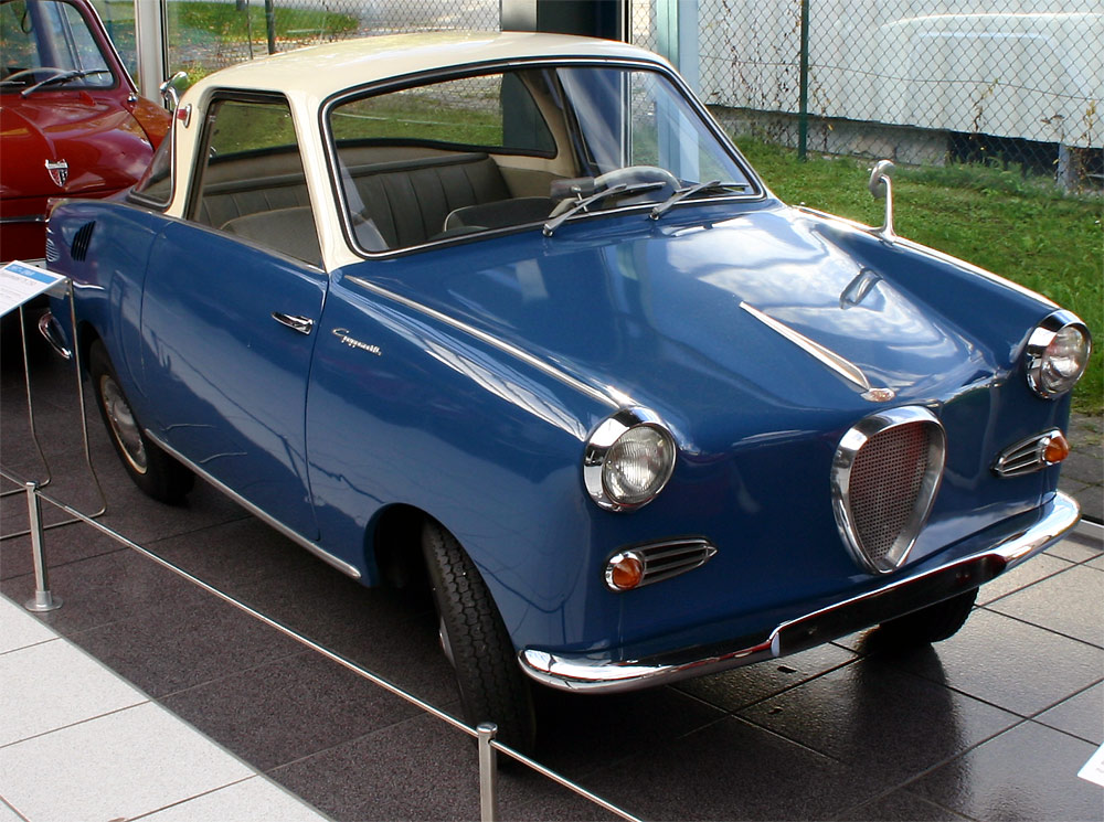 Goggomobil TS 250 Coupe im EFA-Museum für Deutsche Automobilgeschichte first upload in de wikipedia on 01:07, 5. Okt 2004 by Softeis